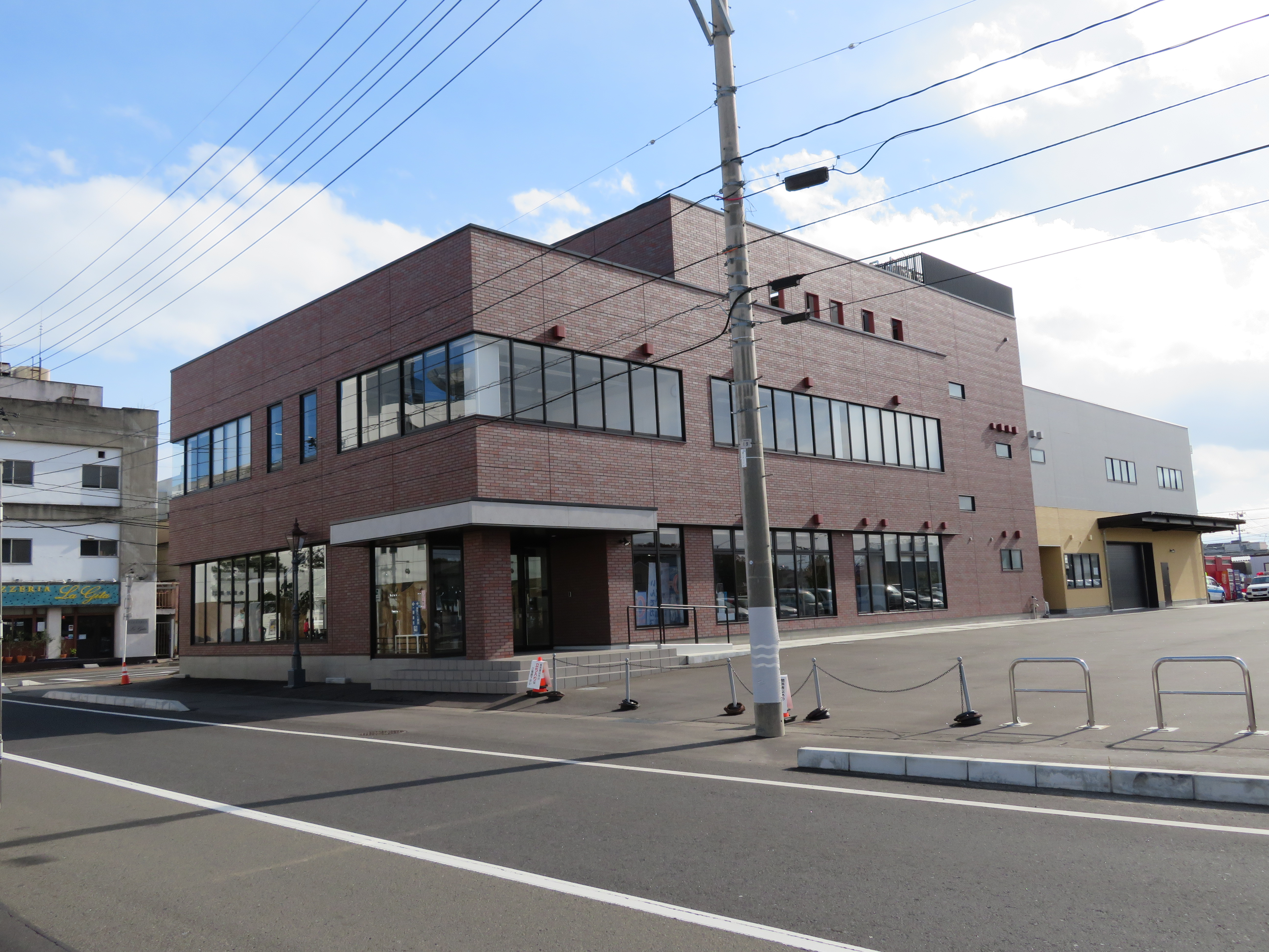 塩釜ガス本社社屋